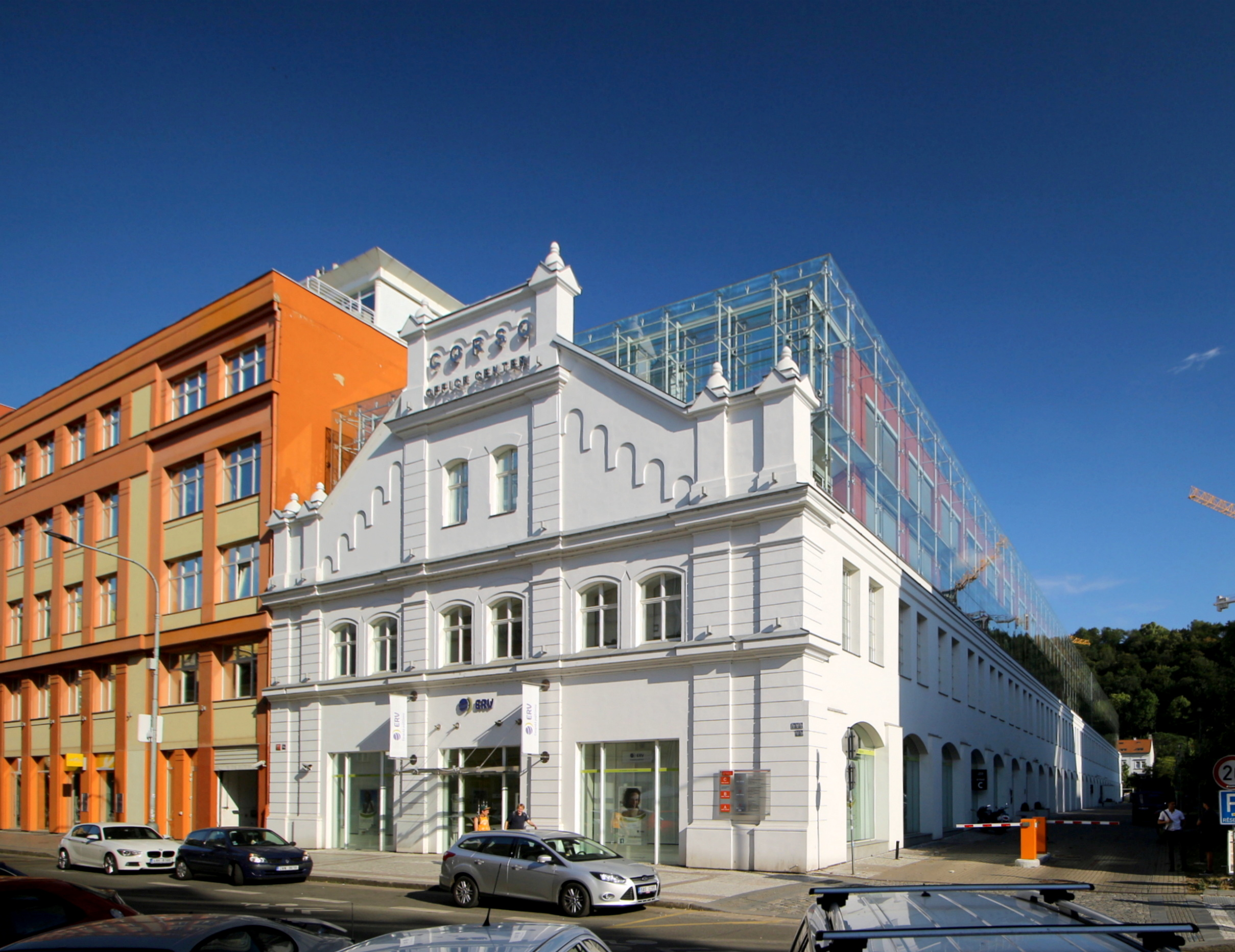 Budova Corso Karlín